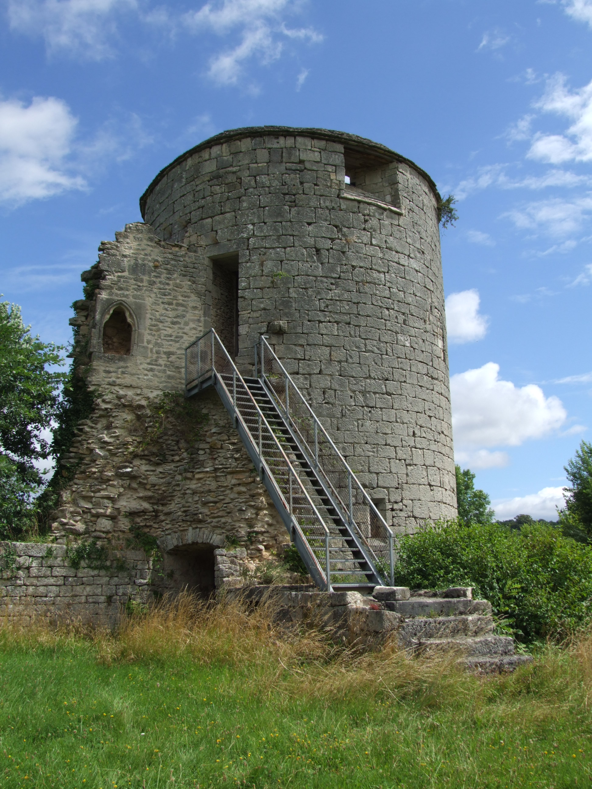 Château de Villaines-en-Duesmois, Côte-d'Or, Bourgogne, FRANCE